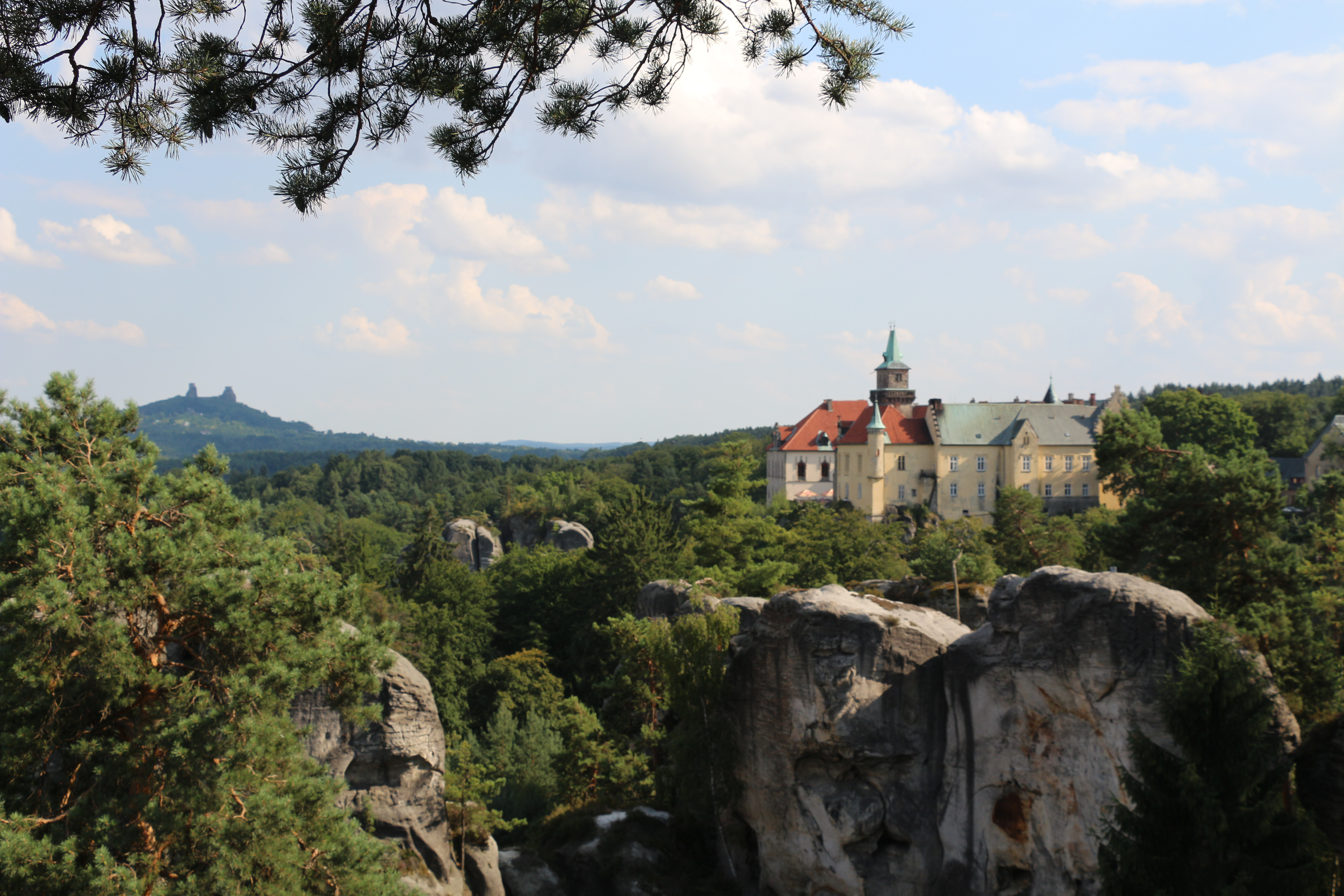 Zámek Hrubá Skála, Hrubá Skála 1, Hrubá Skála.